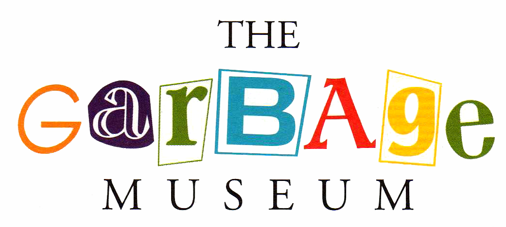 Garbagemuseumlogo